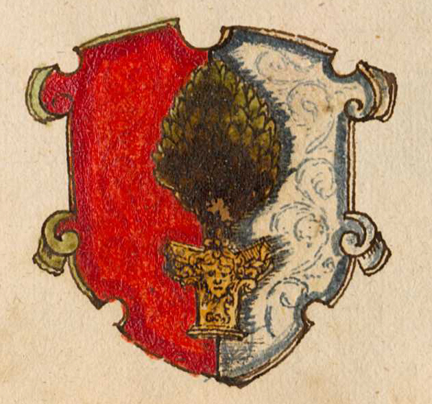 Wappen der Reichsstadt Augsburg